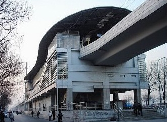 中文（中国大陆）: 东丽开发区站（地铁津滨线）